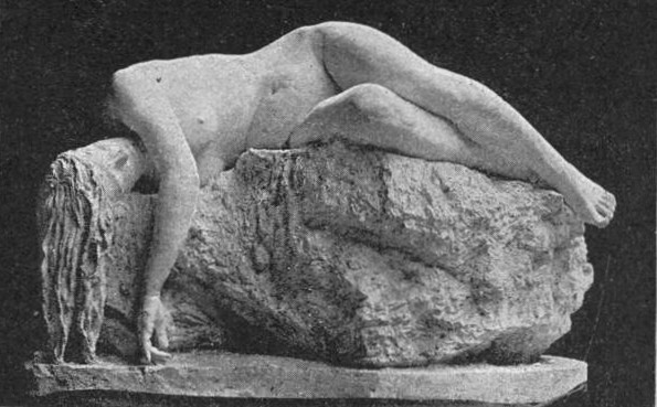 Gestrandet (Gipsfigur)